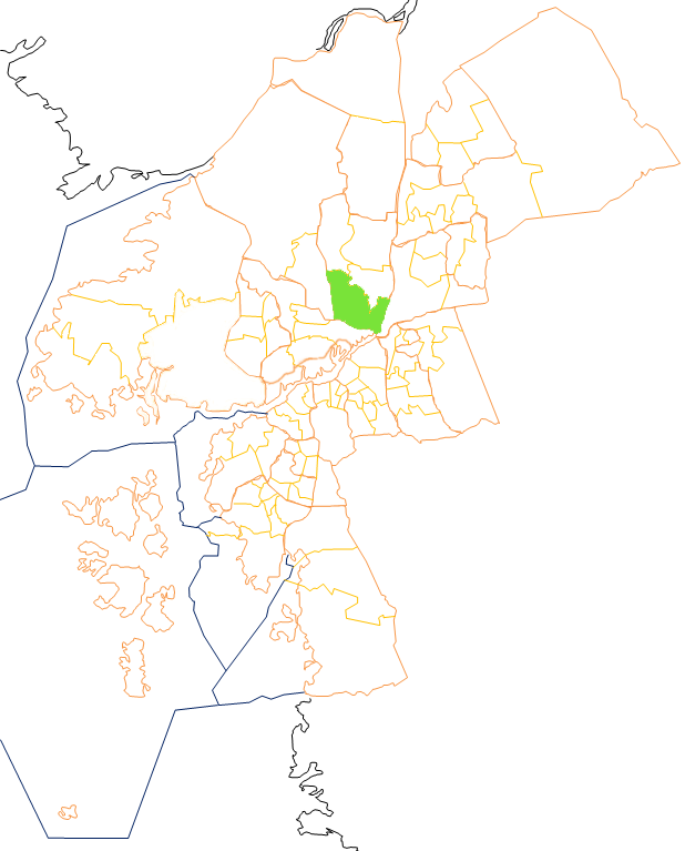 Karta som visar primärområdes belägenhet i Göteborg